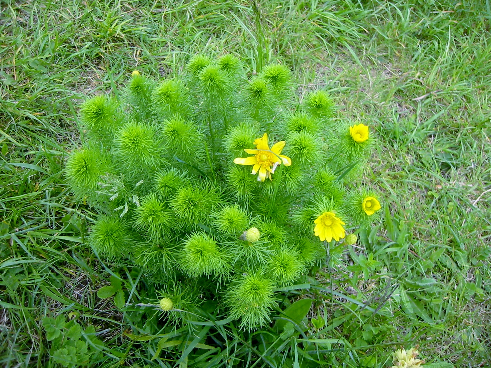 Die Oderhänge Mallnow sind ein 304 Hektar großes Naturschutzgebiet. Mallnow ist ein Ortsteil der Stadt Lebus im Landkreis Märkisch-Oderland in Brandenburg. Das Naturschutzgebiet ist u.a. für die Blüte des Adonisröschens bekannt.